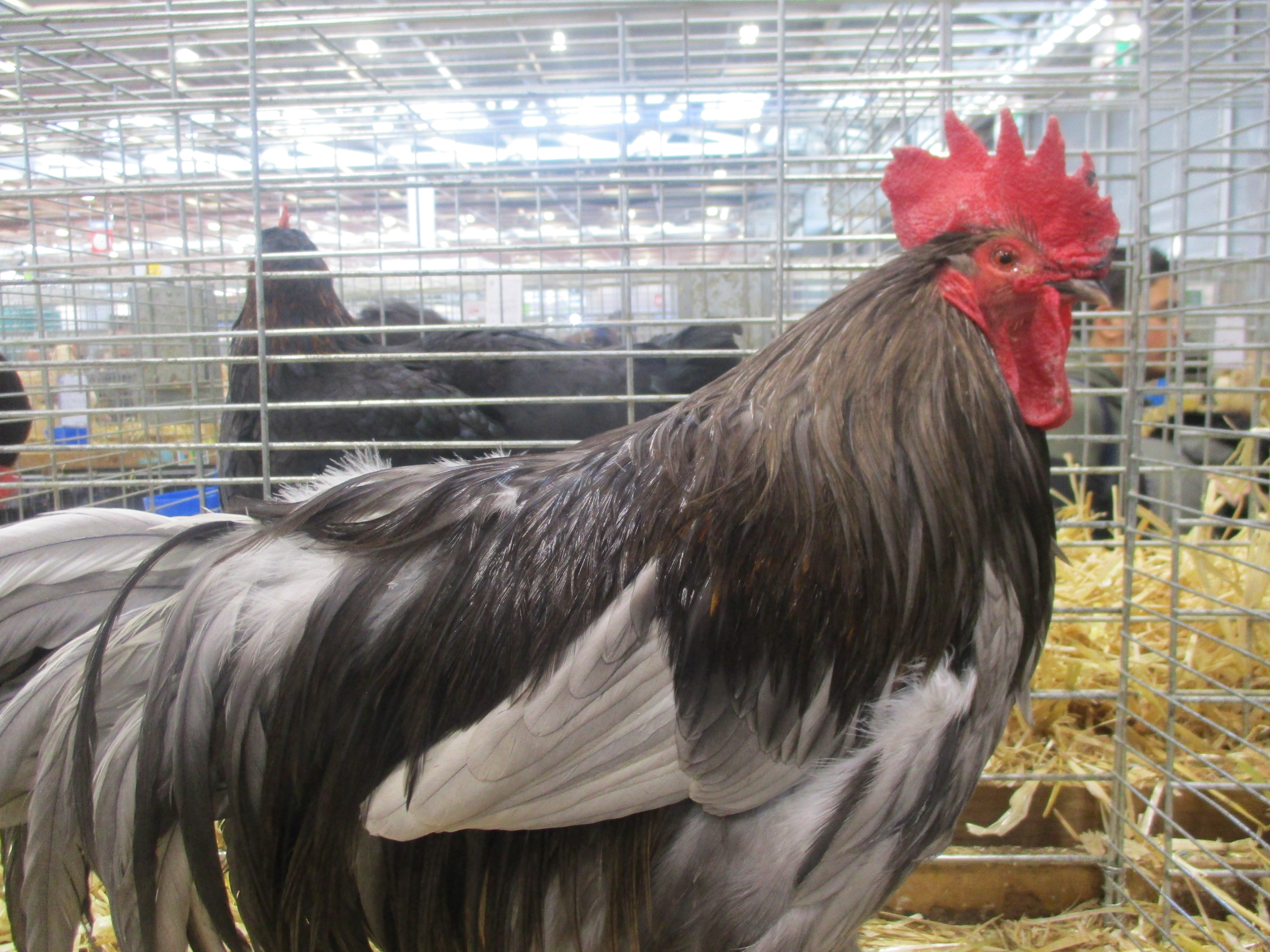 Coq du Limousin bleu.